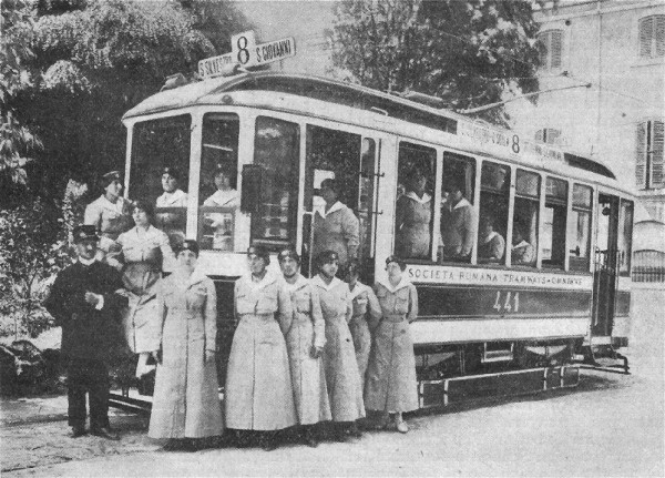 Donne fattorine srto